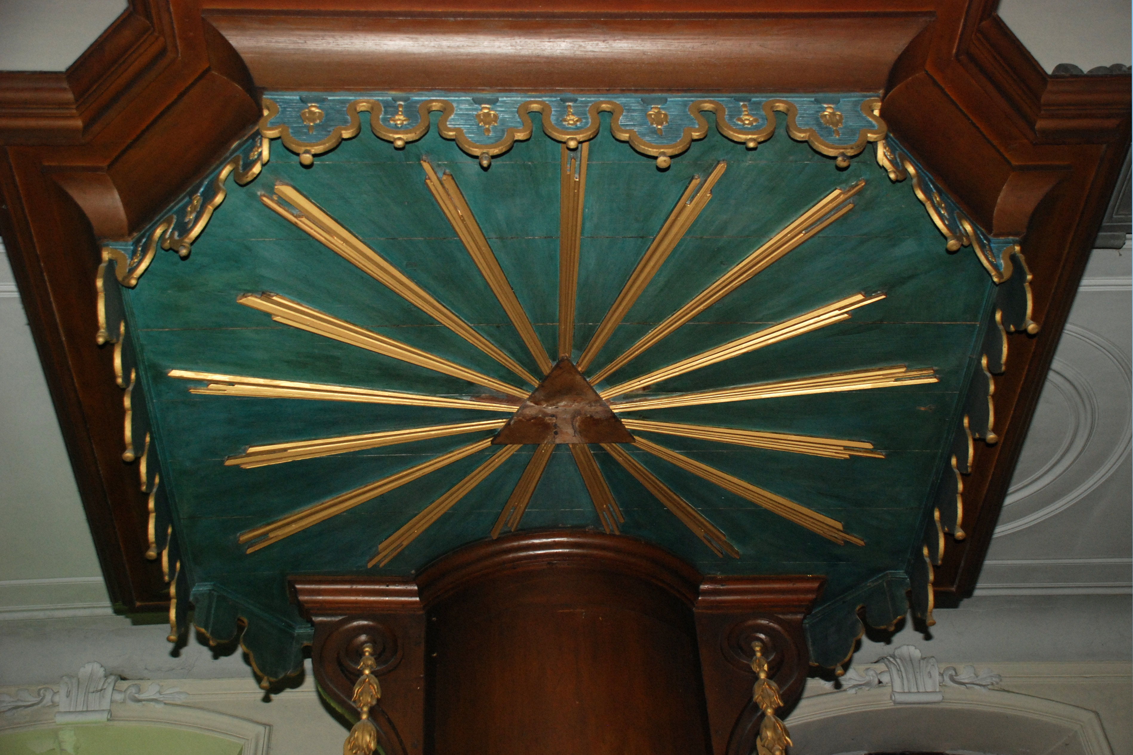 Belgique - Brabant wallon - Église de Court-Saint-Étienne